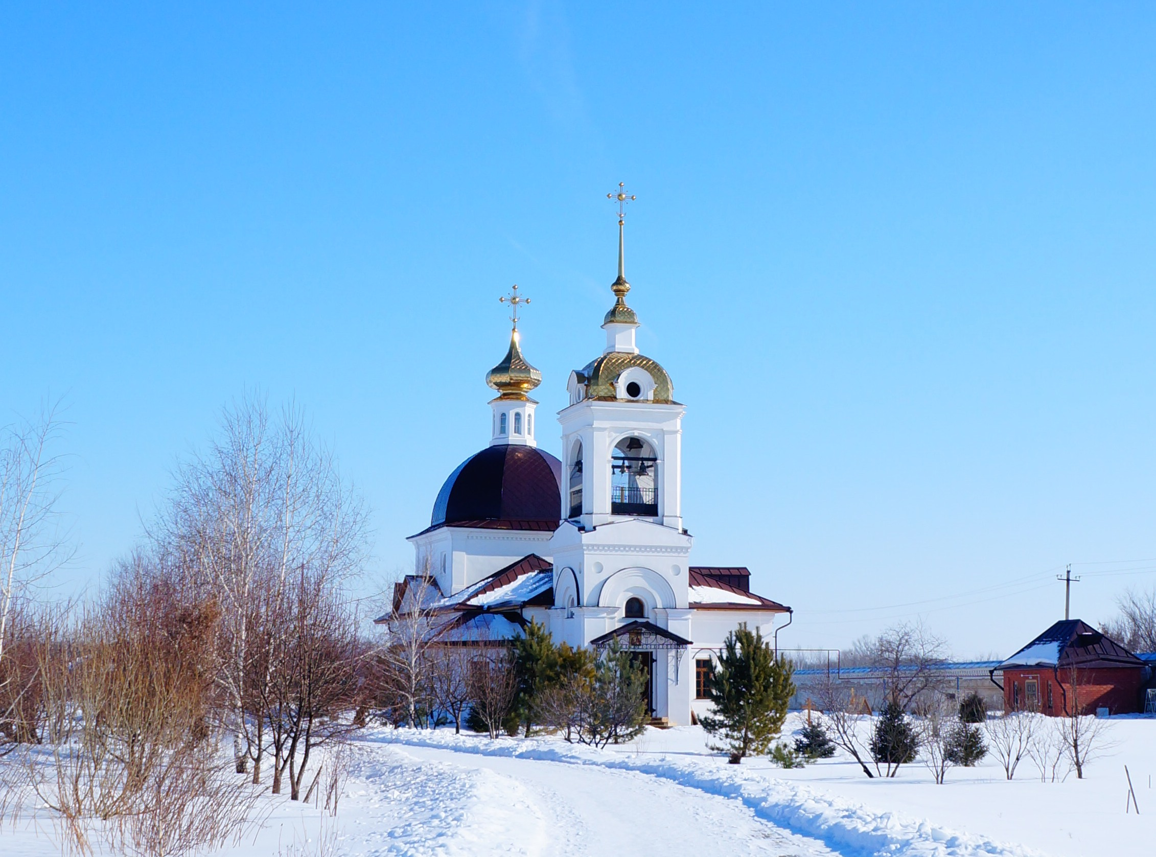 Свято-Никольский монастырь, Саратовская область, Россия